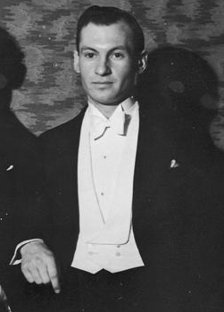 3rden:Chopin Competition laureates (from left) Jakow Zak, Roza Tamarkina, Witold Małcużyński, Lance Dossor